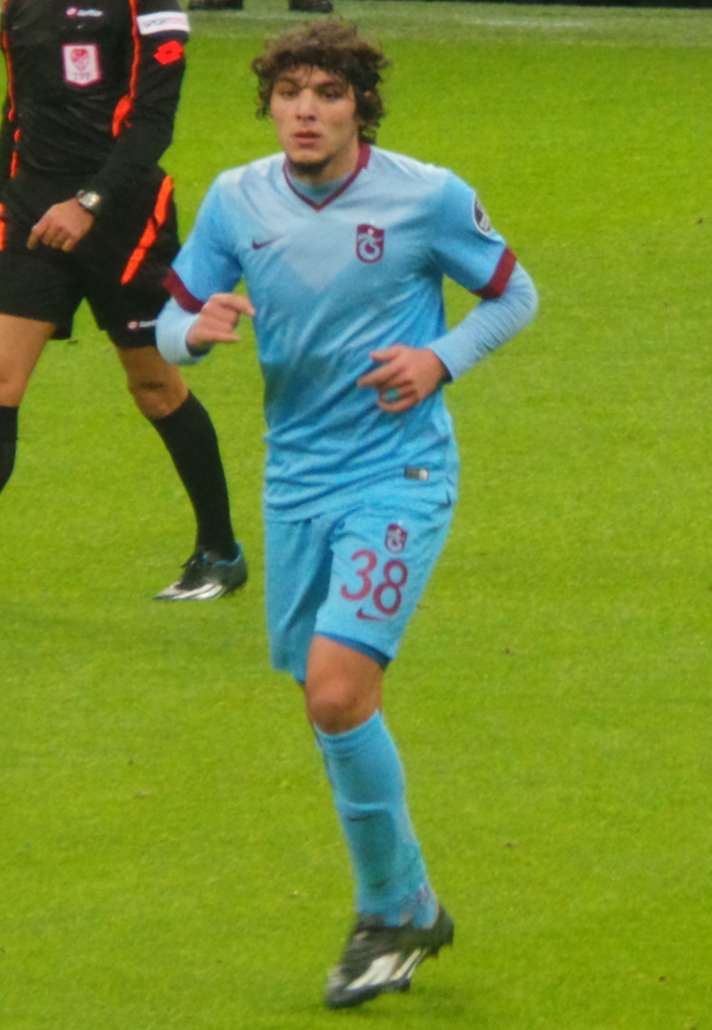 Salih Dursun, Trabzonspor formasıyla eski takımı Galatasaray'a karşı Türk Telekom Arena'da